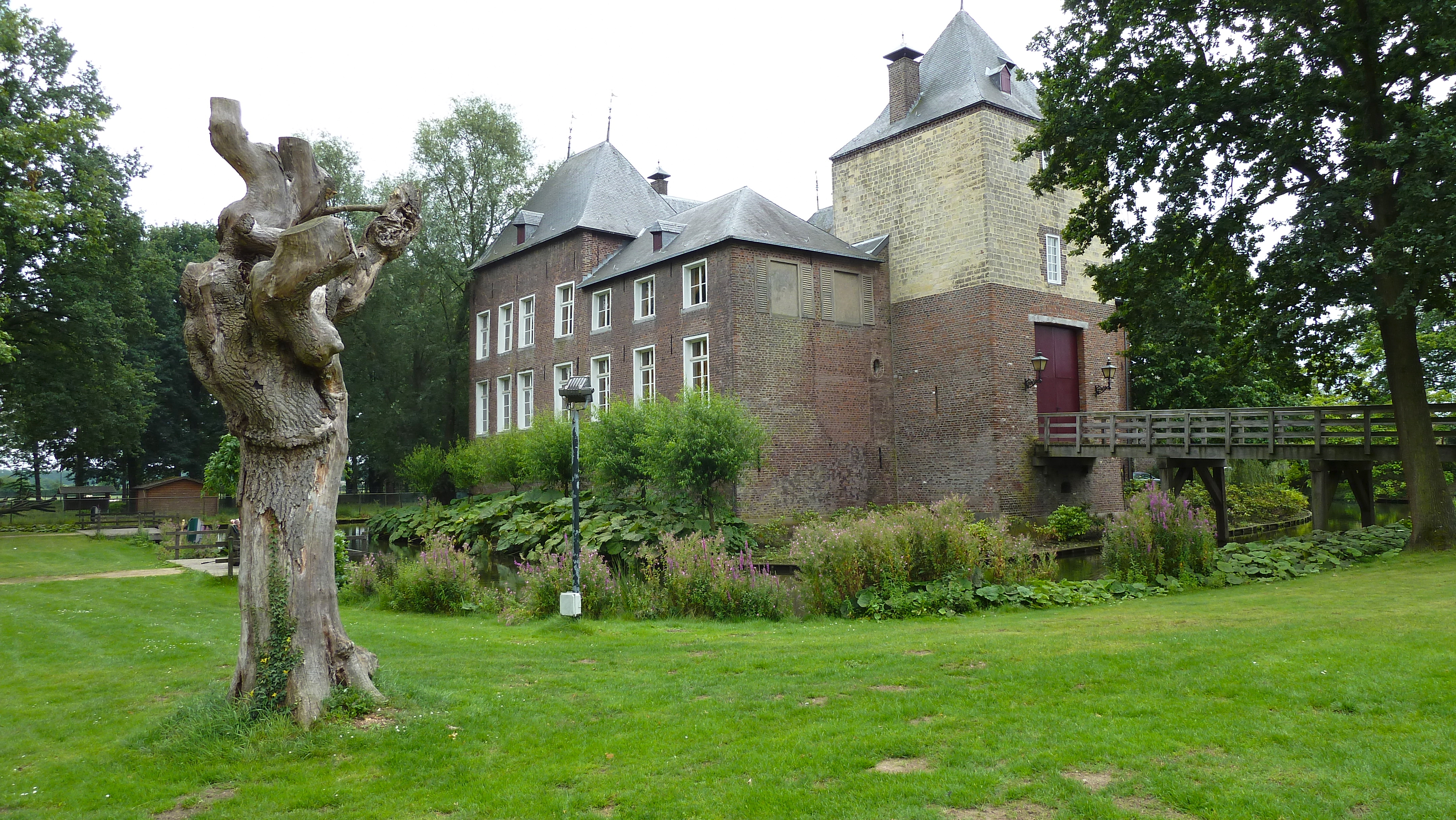 Zomer 2011